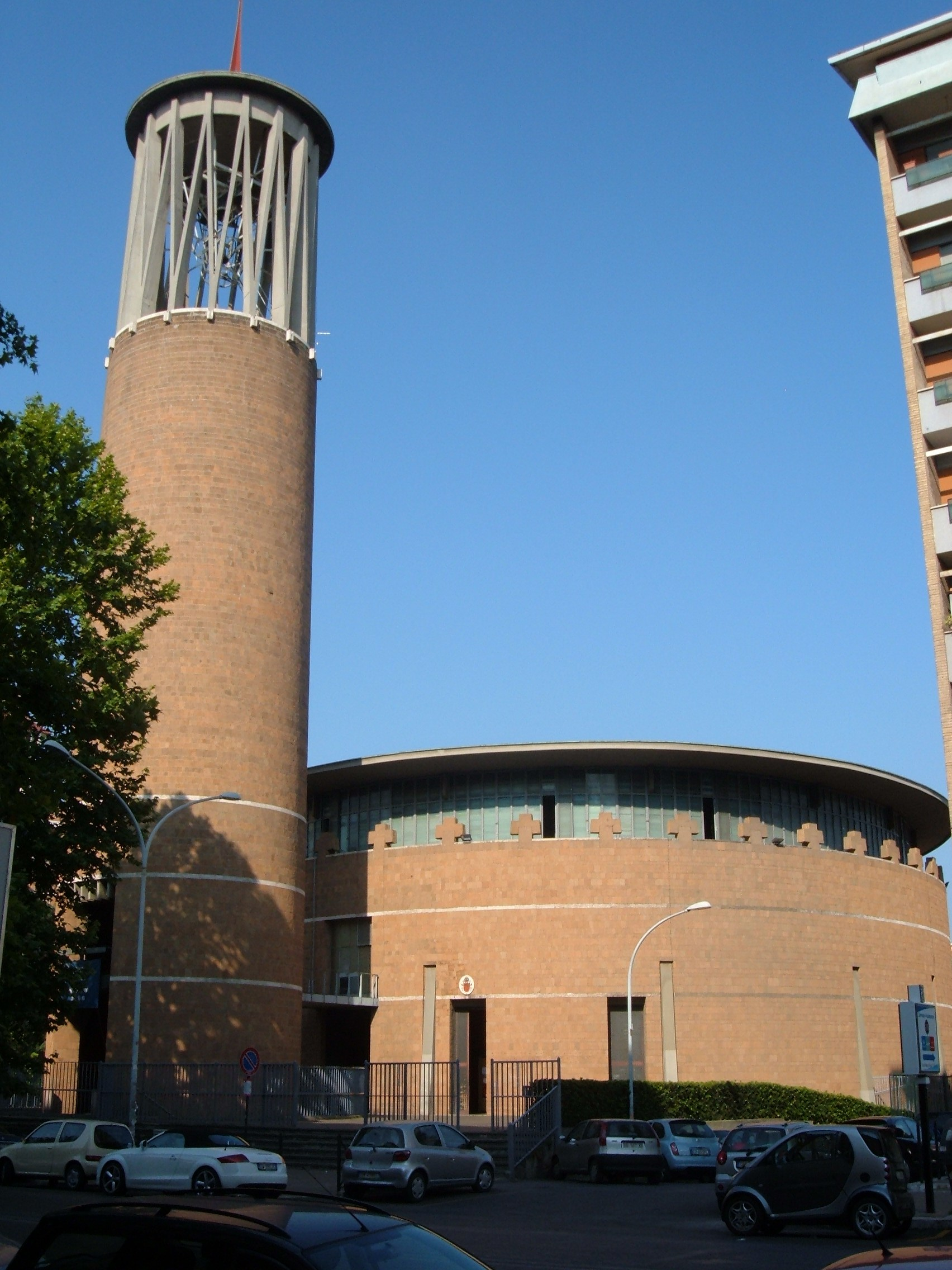 Chiesa di Gesù Divino Lavoratore, a Roma, nel quartiere Portuense.